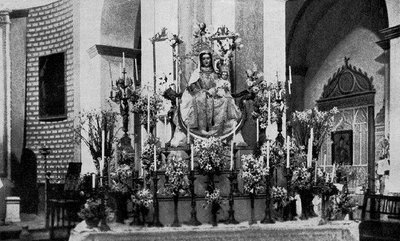 Antigua talla de Nuestra Señora de Gracia, patrona de Alhaurín el Grande, destruida durante la contienda bélica de 1936-1939.